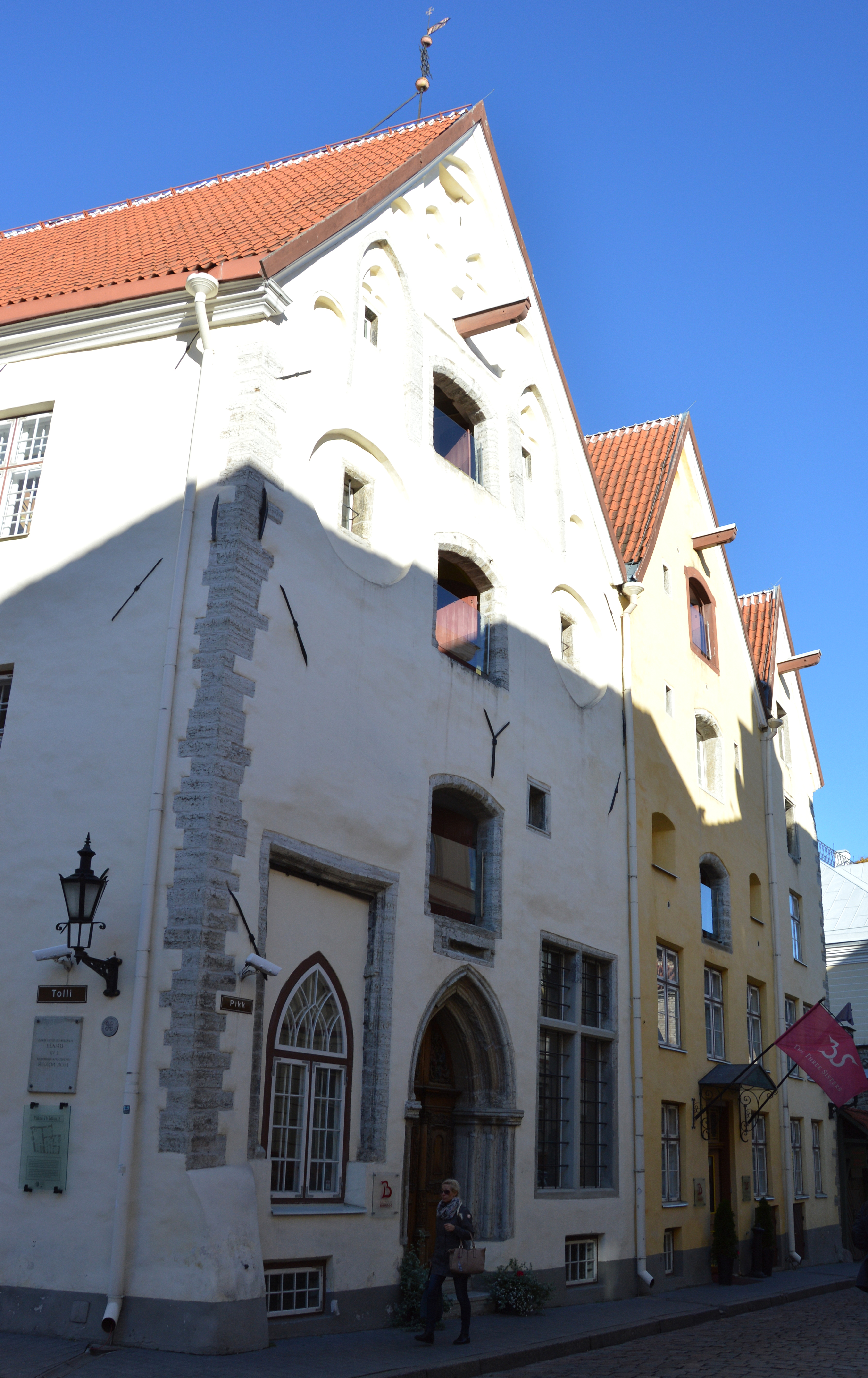 Die Drei Schwestern, Häusergruppe in Tallinn / Reval